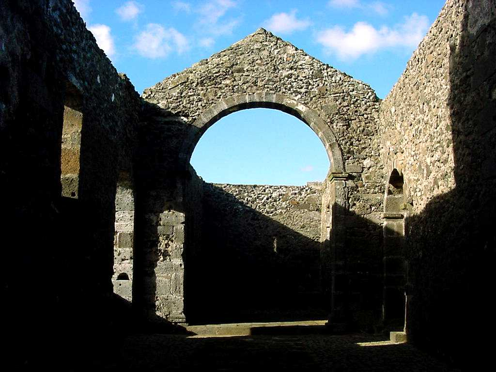 Igreja Velha de São Mateus da Calheta, arcada central, Terceira, Açores, Portugal.